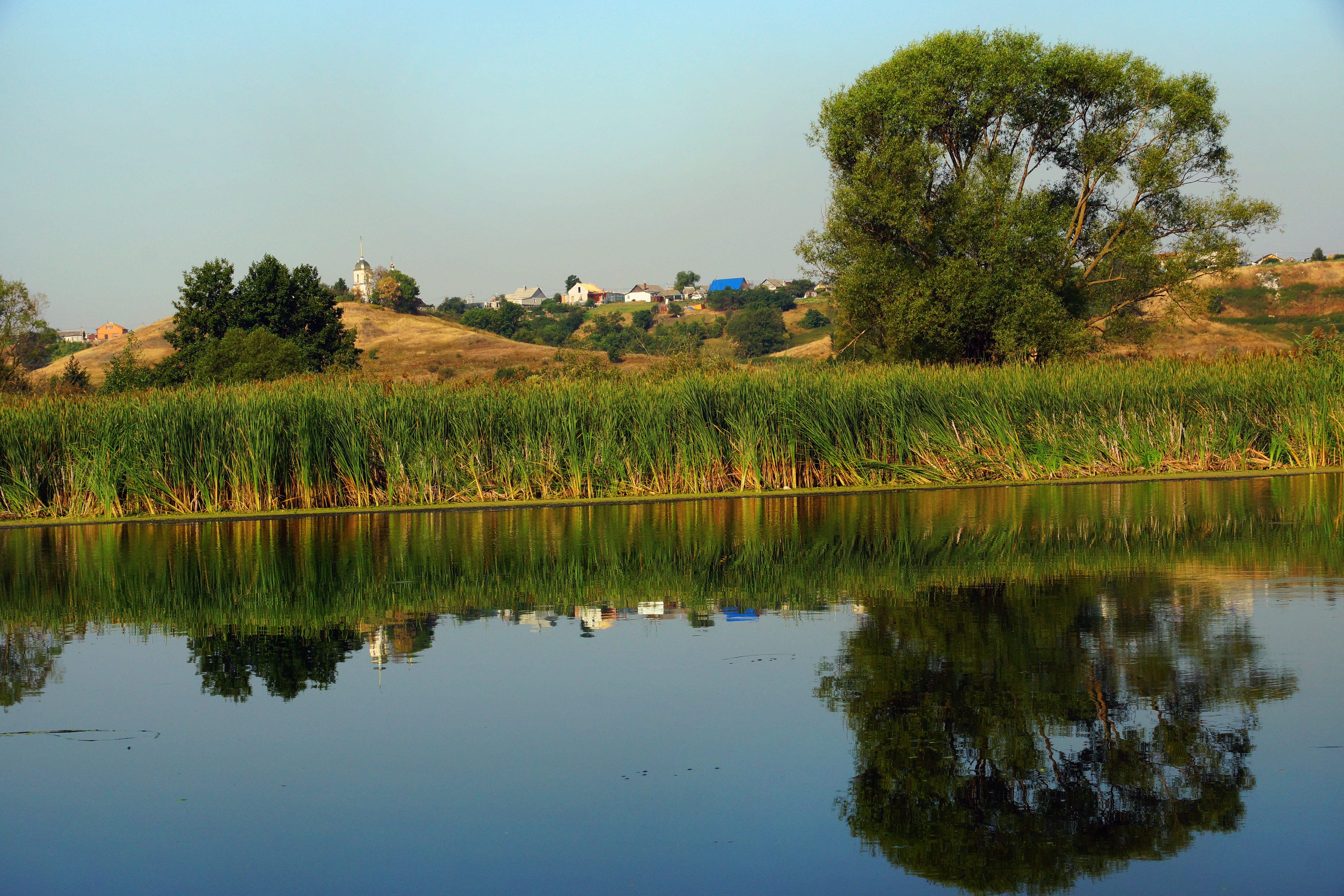 Ленино(Романово).